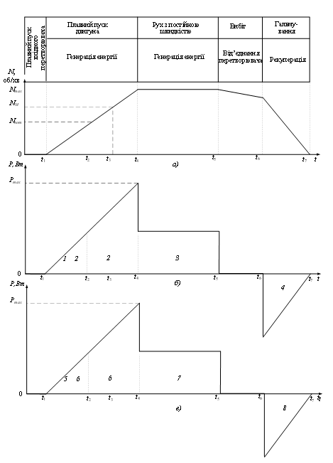 Рис.6